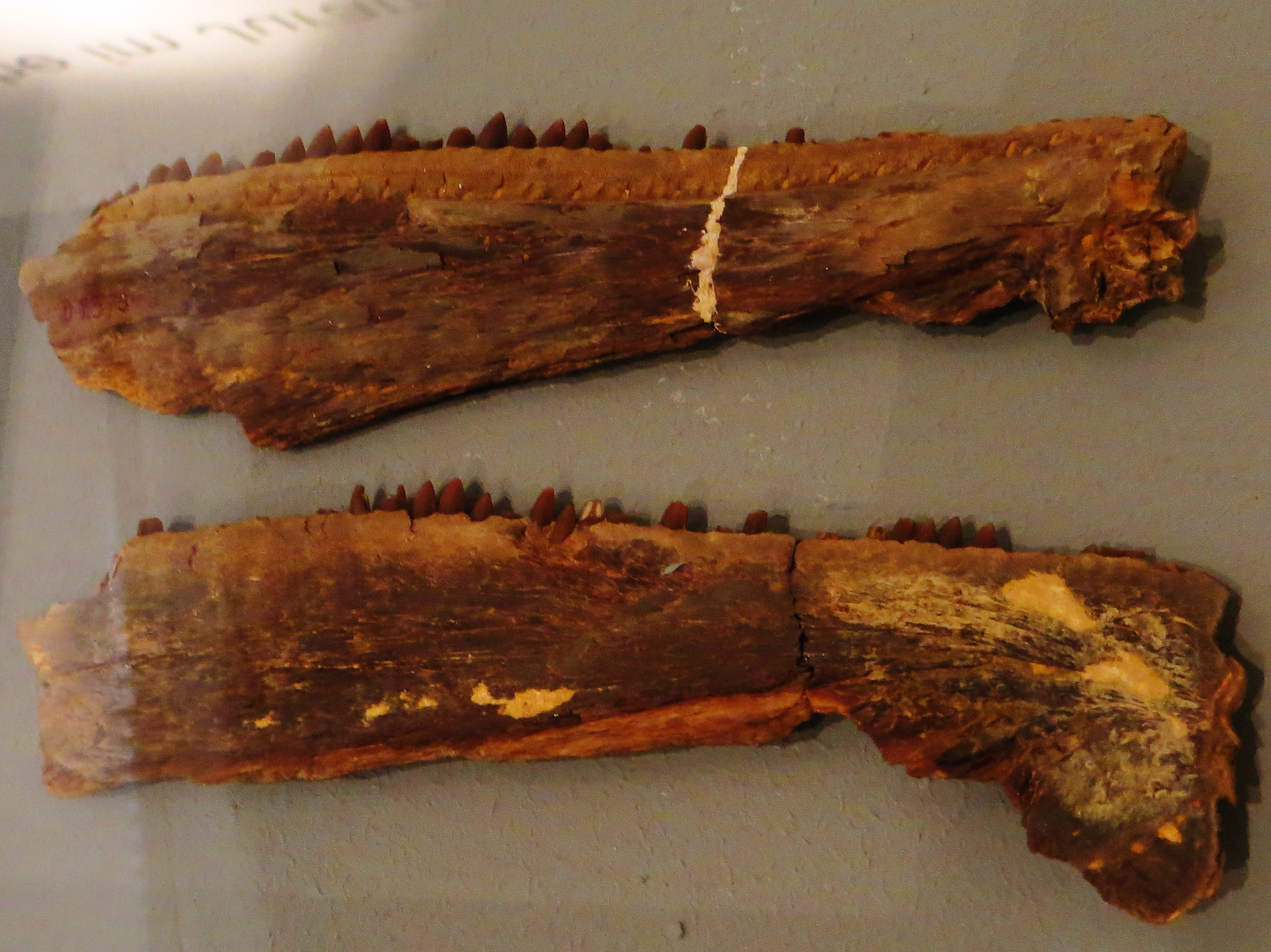 Fossil of Saurocephalus, an extinct fish - Took the picture at Museum of Paleontology, Tuebingen